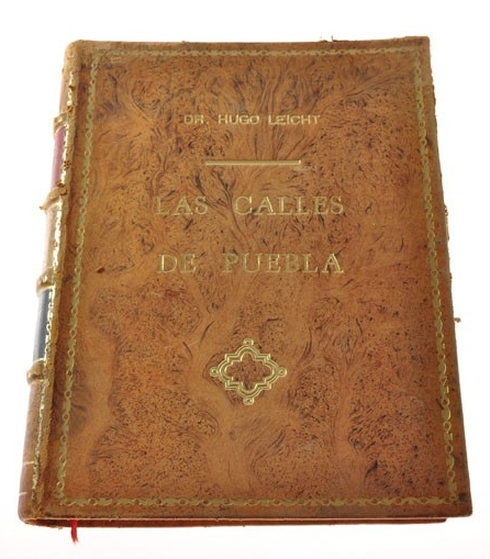 Edición de 1967 del libro "Las Calles de Puebla" del Dr. Hugo Leicht